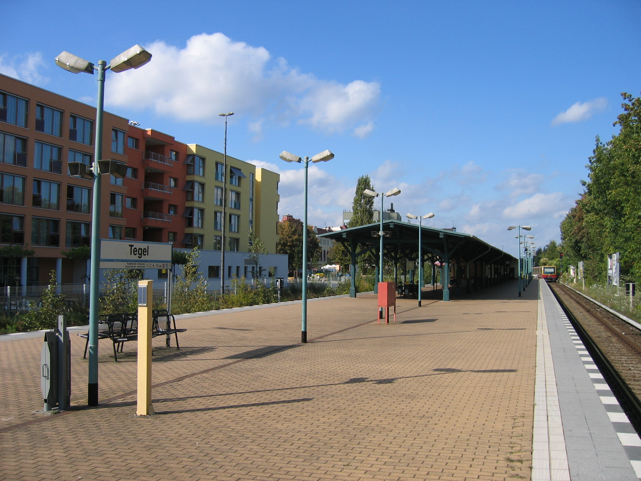 S-Bahnhof Tegel, Berlin